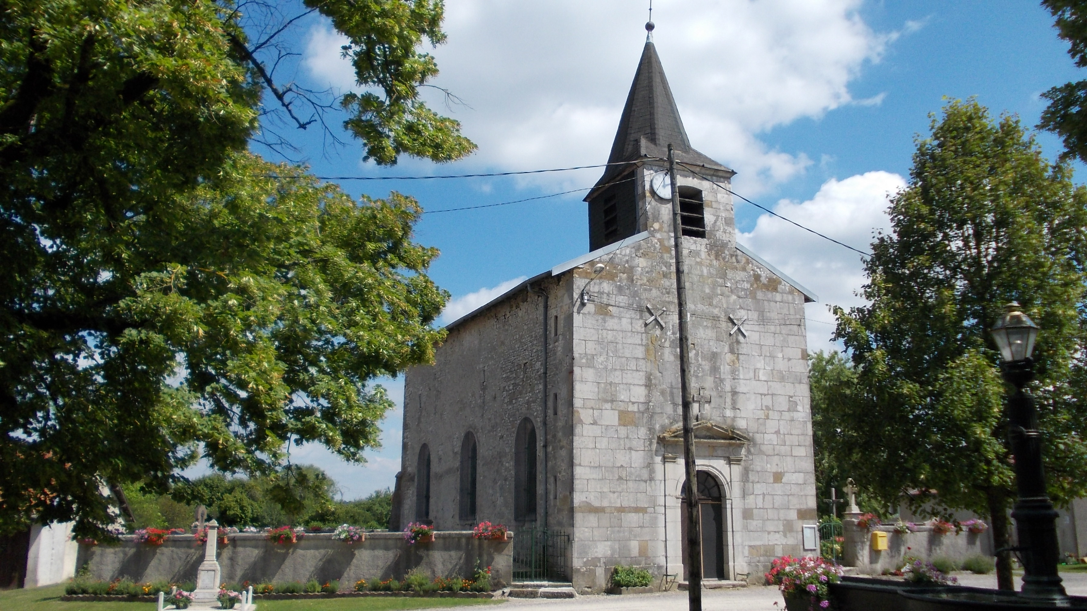 Église de la commune Villeroy-sur-Méholle